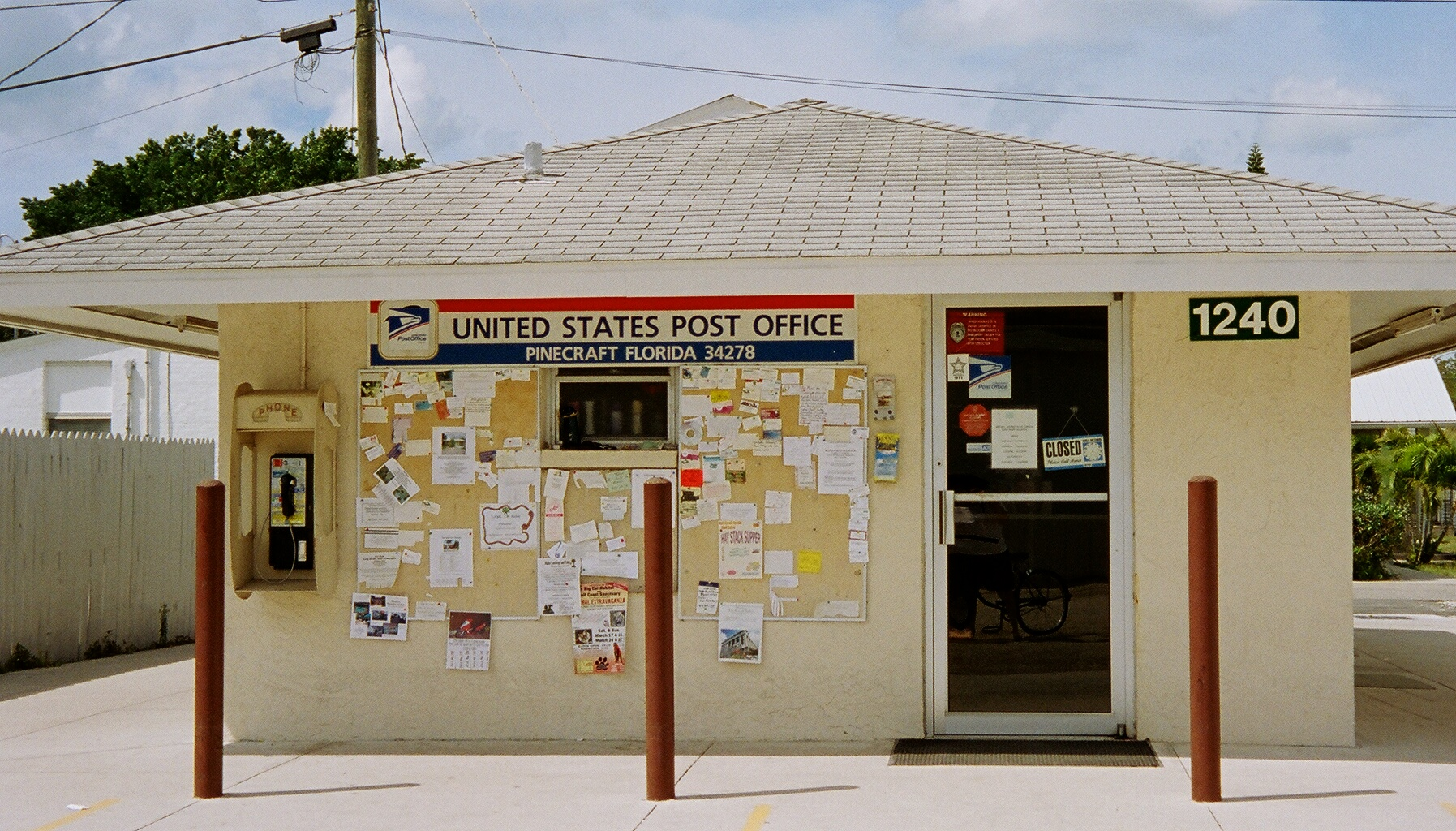 Pinecraft Florida Post Office, 1240 Yoder Avenue, Pinecraft Florida 34278